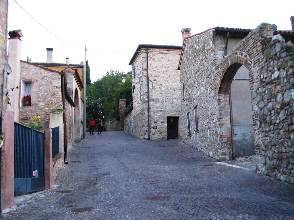 Scorcio del Borgo Medievale di Arquà